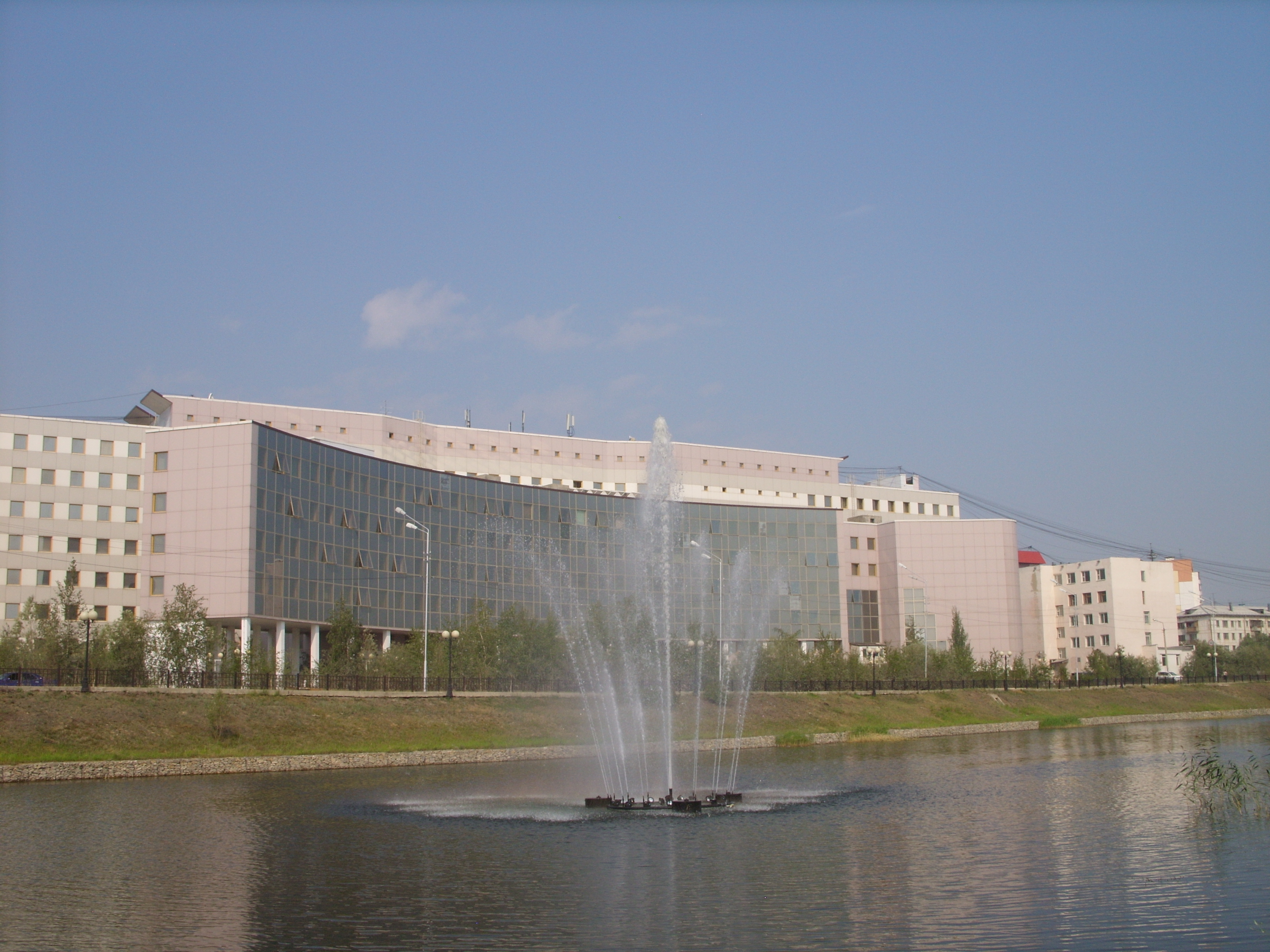 Якутск. Корпус факультетов естественных наук СВФУ. Снимок 2011 г.